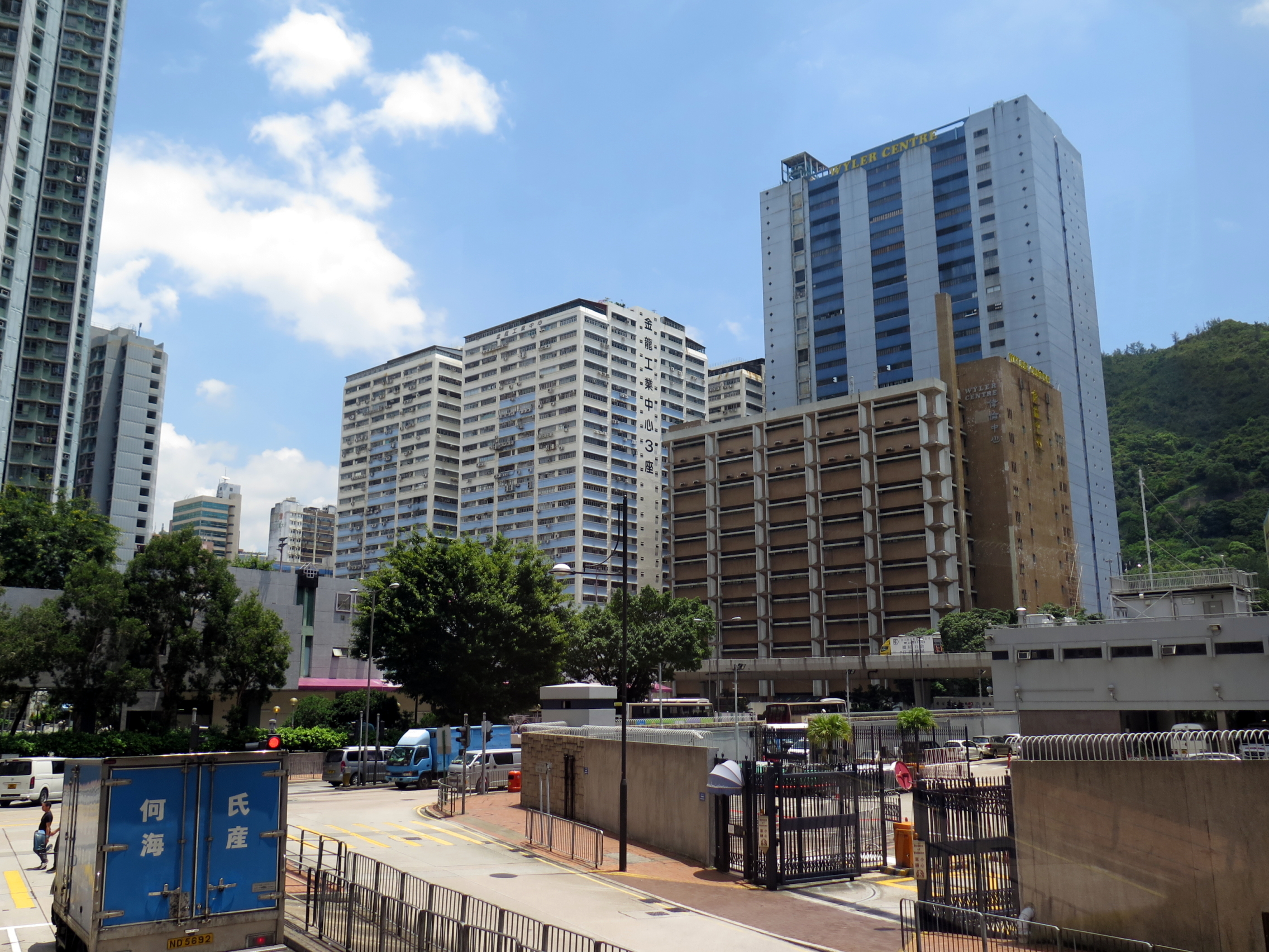 Kwai Chung Industrial Buildings